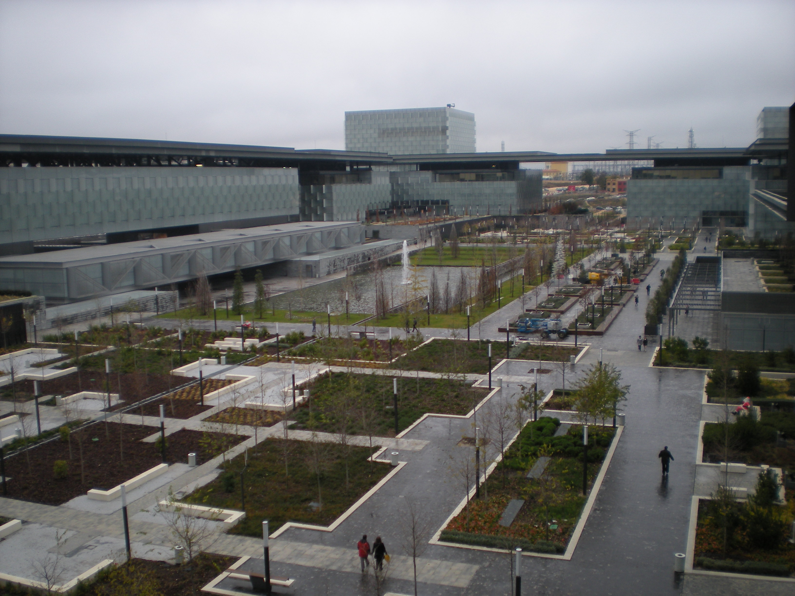 Distrito C (7 de diciembre de 2009).